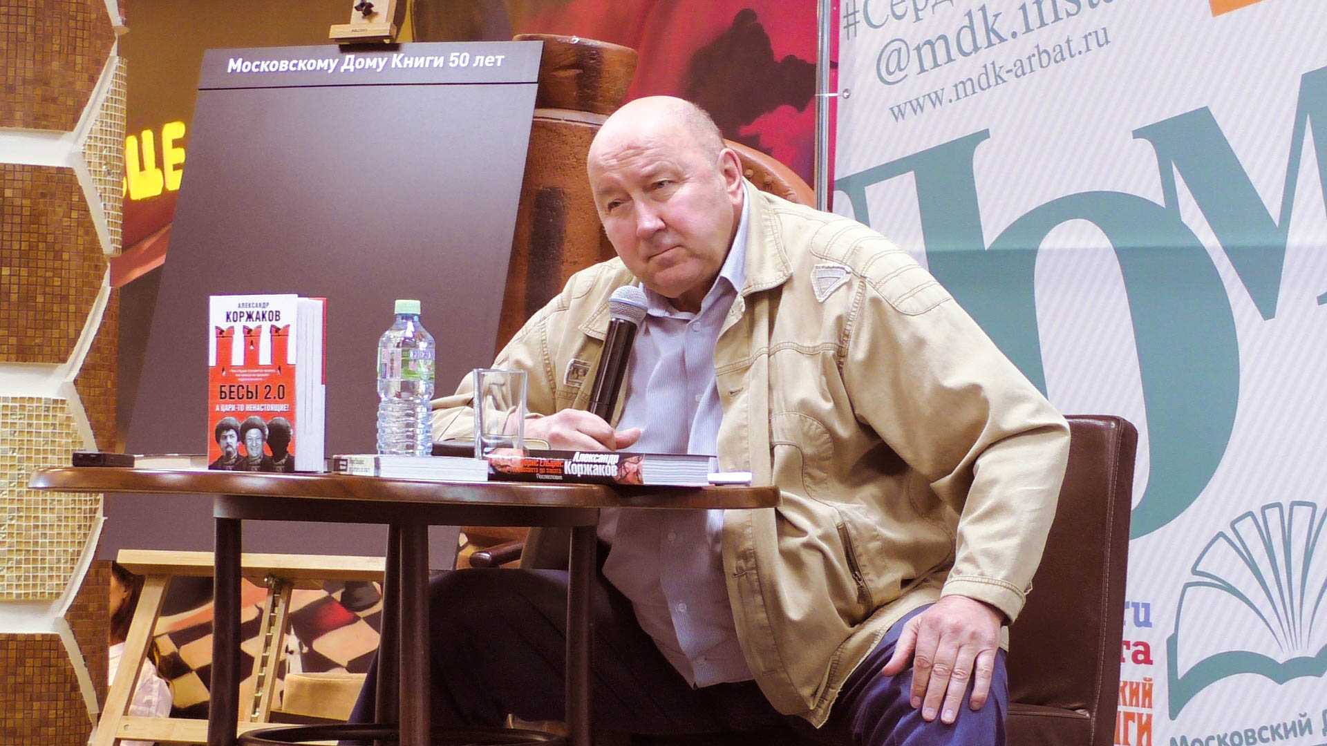 Александр Коржаков в Московском Доме Книги 10.06.2017.